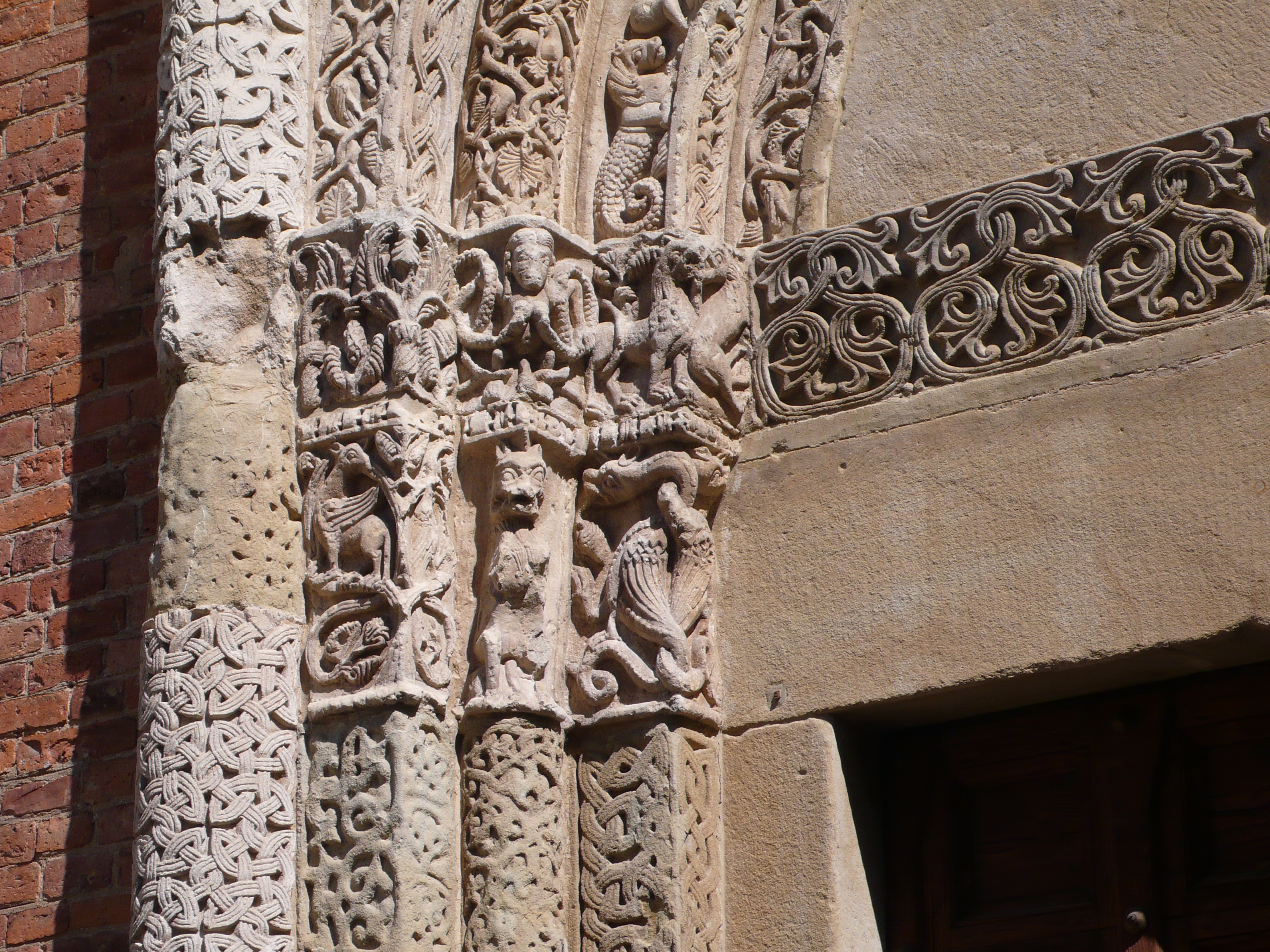 Pavia, San Pietro in Ciel d'Oro, Portal, Detail.